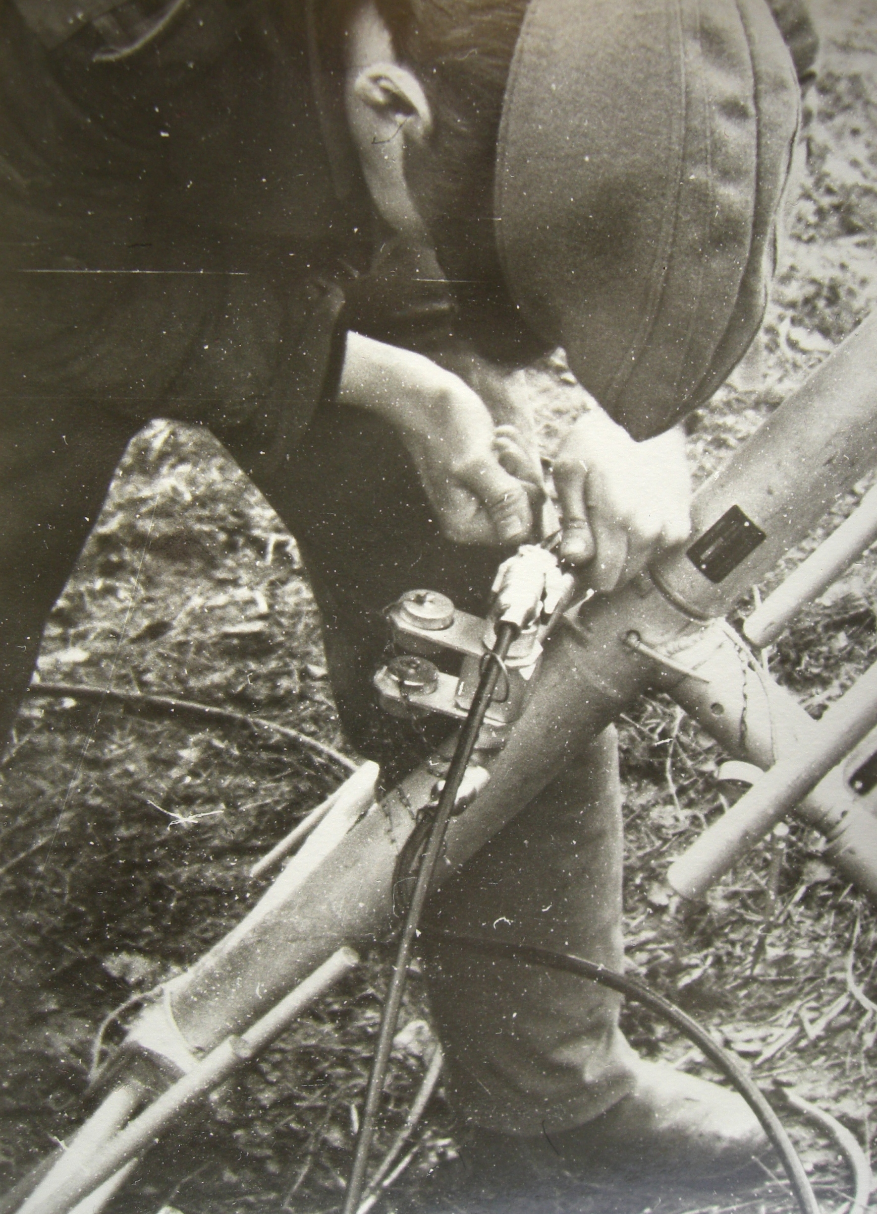 Der Truppführer schließt das Antennenkabel an.